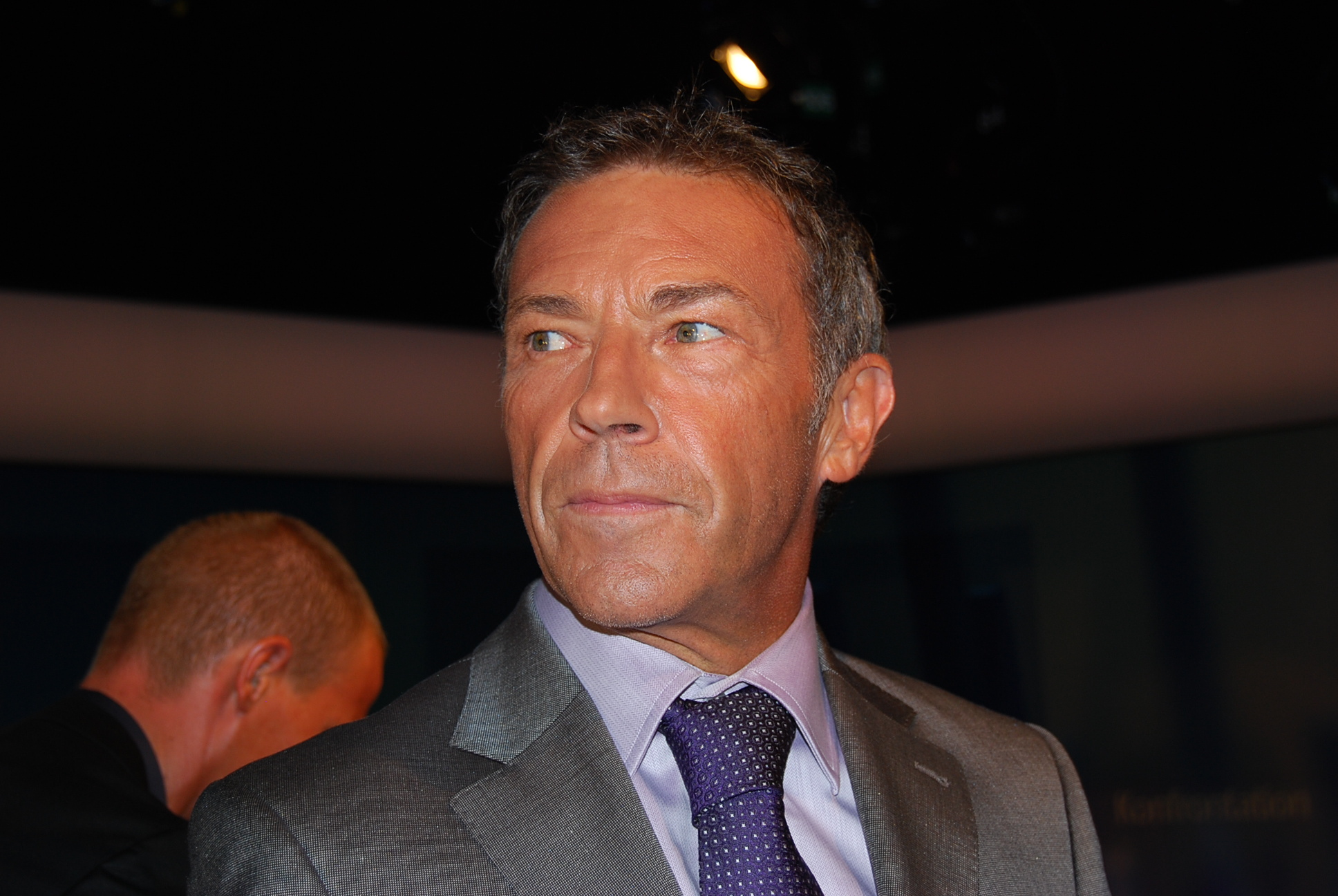 Jörg Haider, 04.09.2008